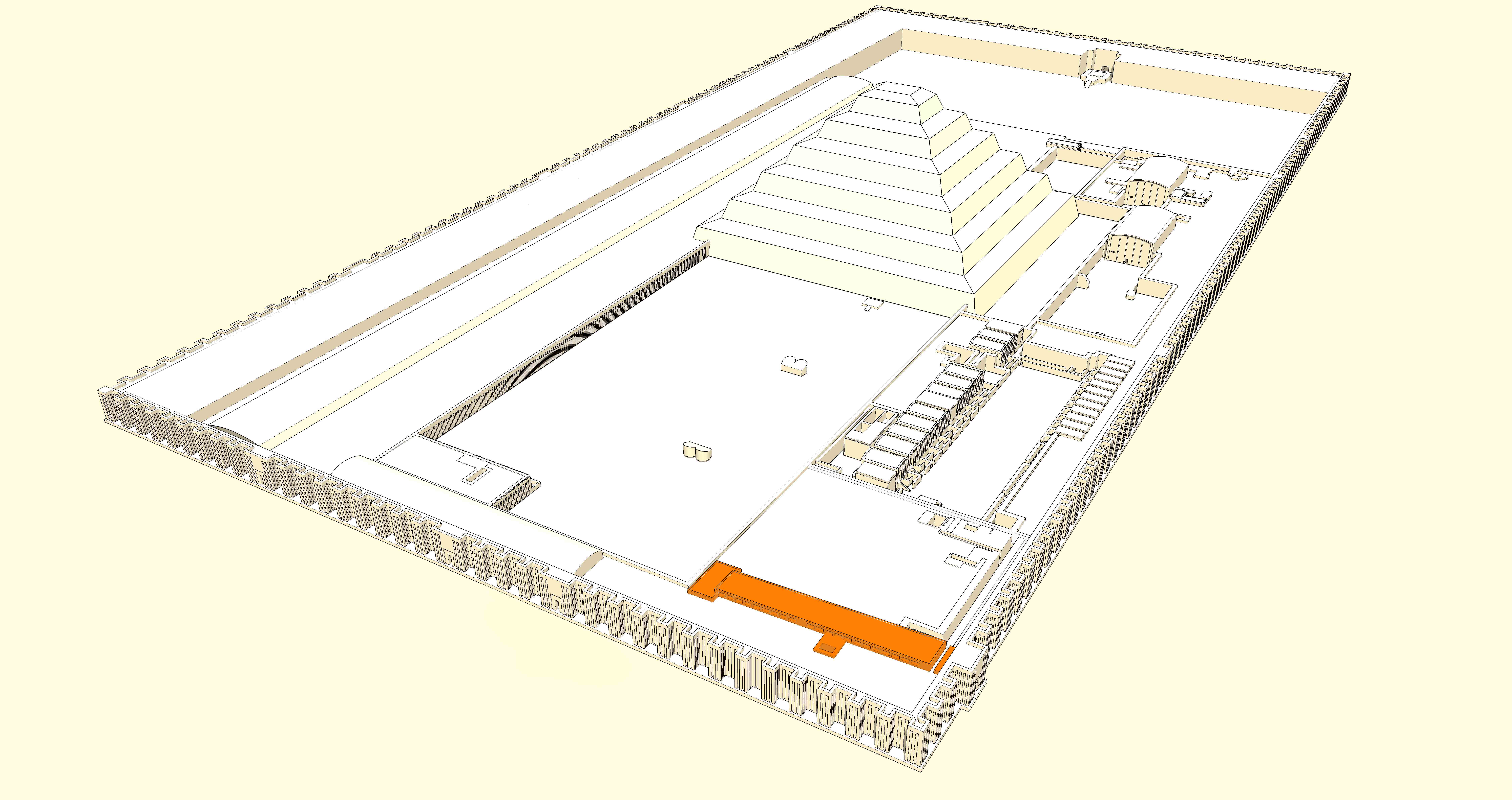 Position de l'entrée principale et de la colonnade dans le complexe funéraire de Djoser